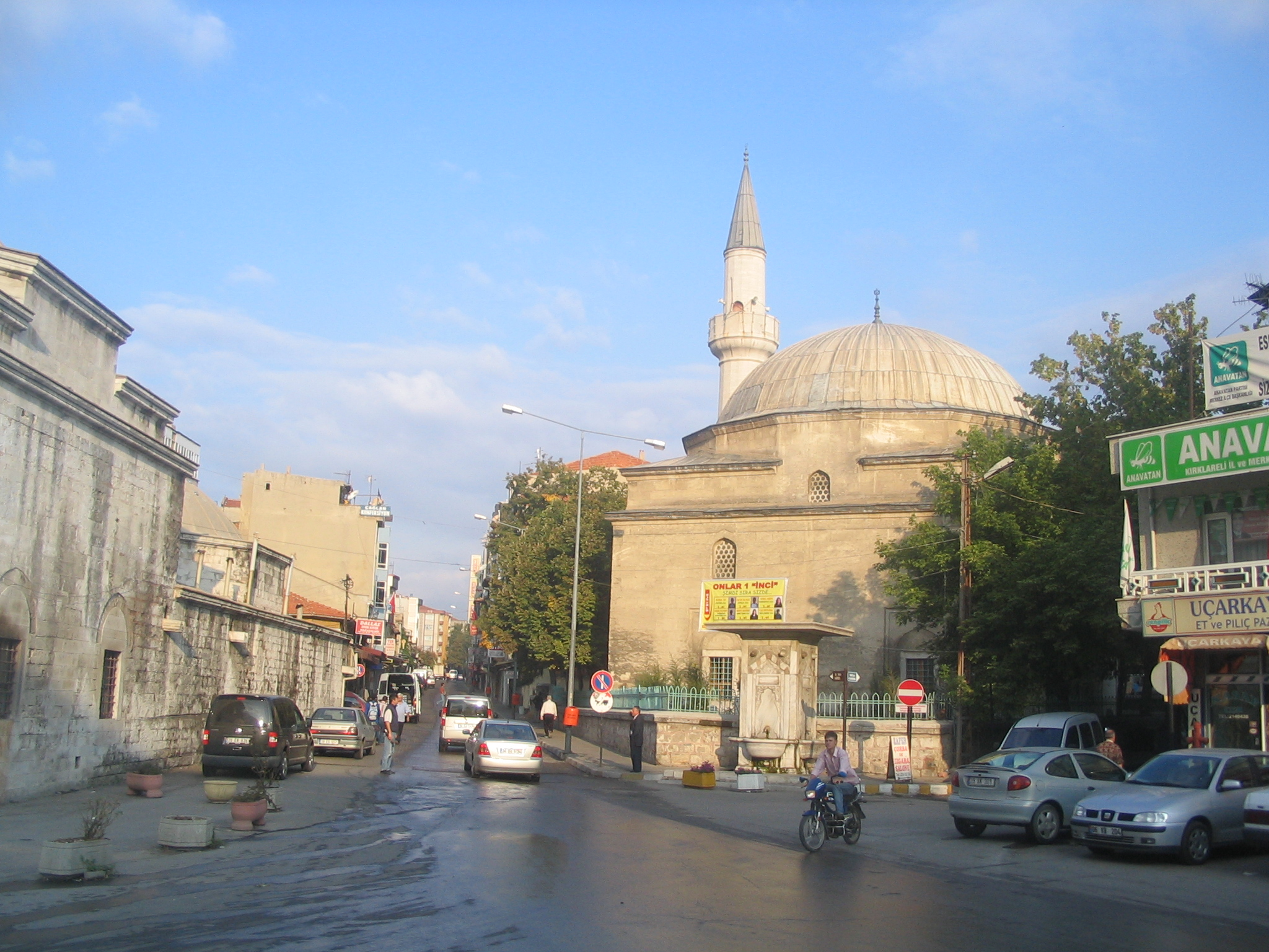 Street in Kirklareli, Turkey